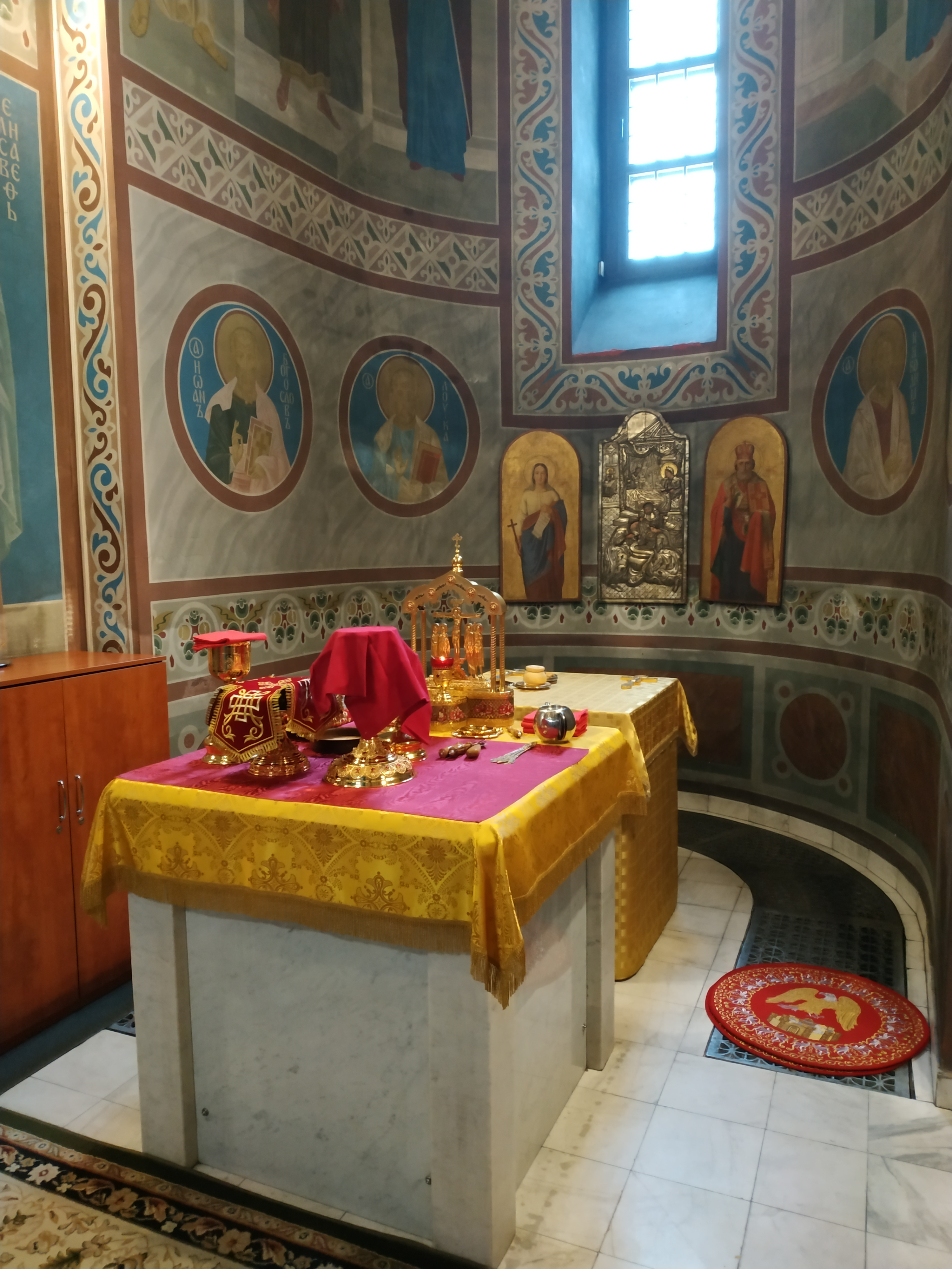 жертовник у Михайлівському золотоверхому соборі. (Київ 2018)